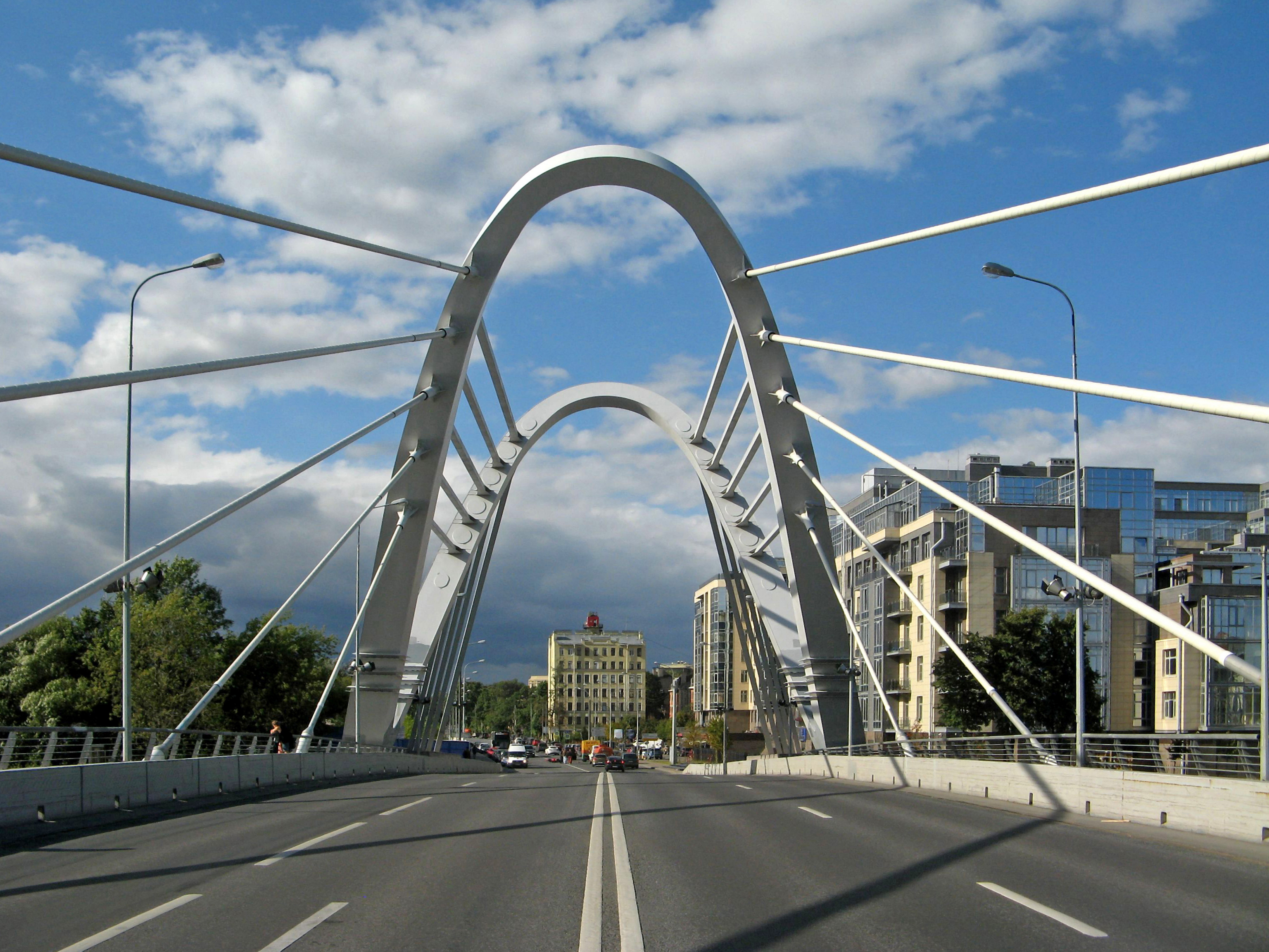 Лазаревский мост, Санкт-Петербург